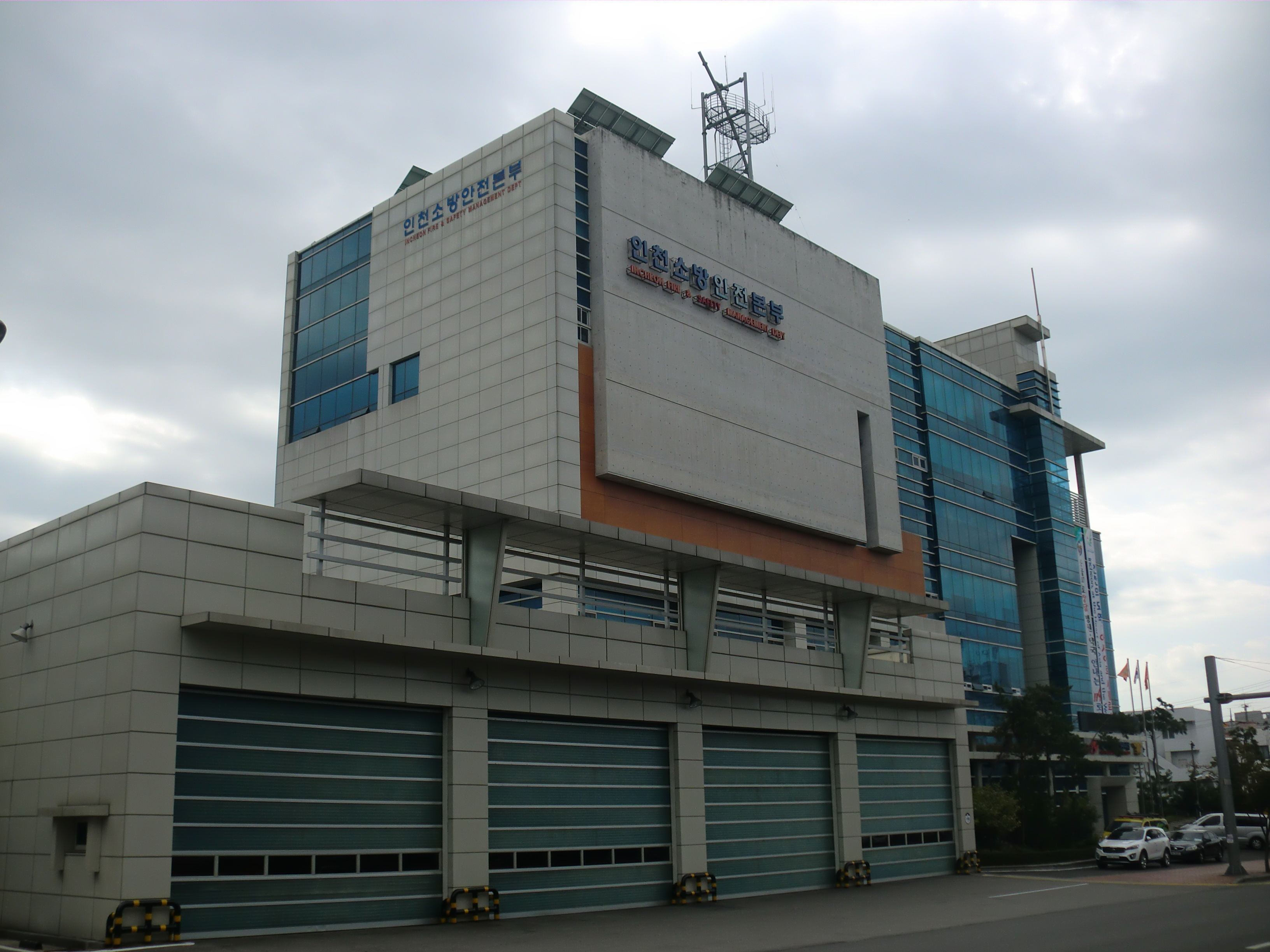 인천광역시 남구에 있는 인천소방안전본부 및 인천남부소방서